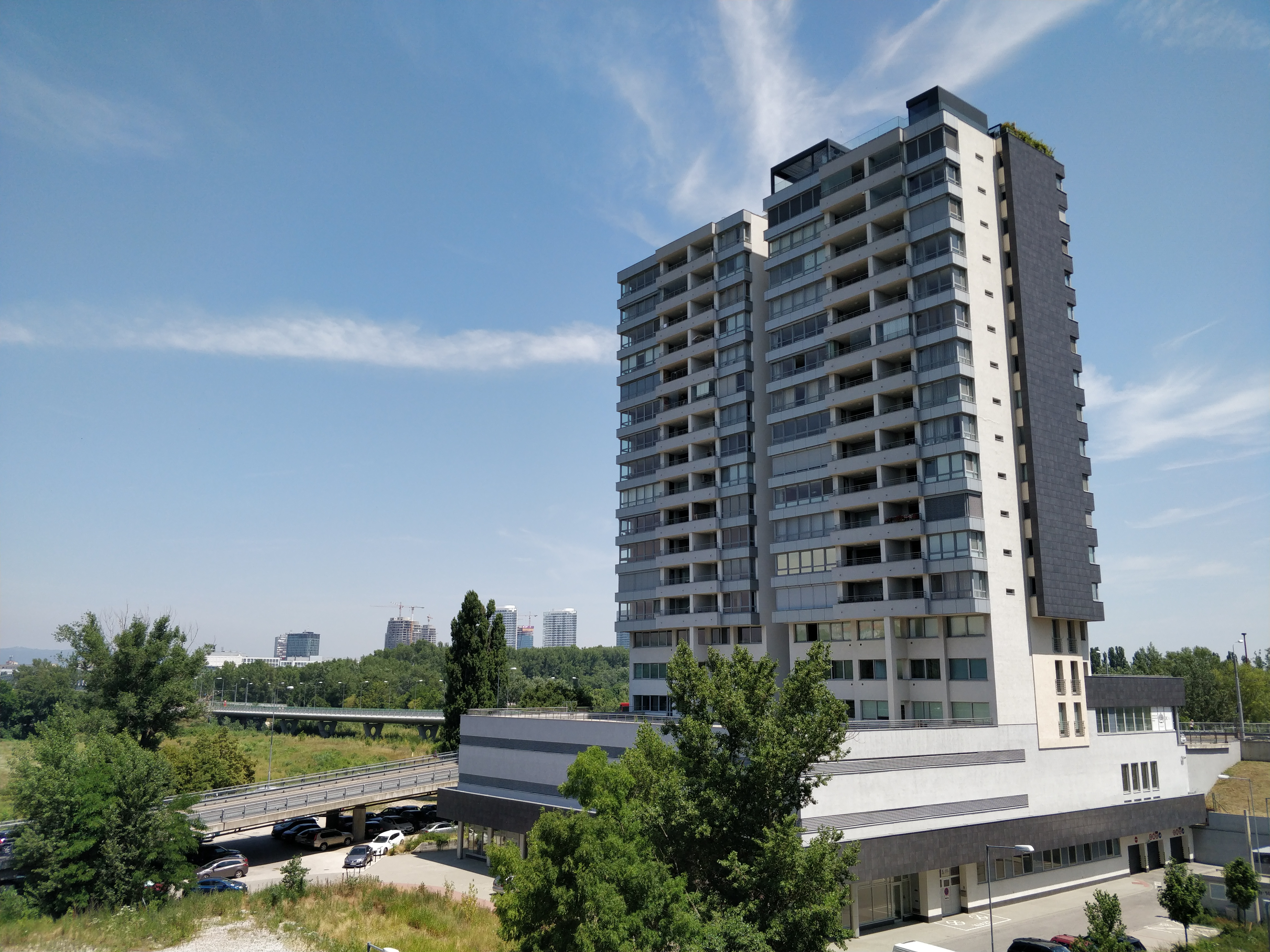 Vienna Park, Krasovského, Bratislava